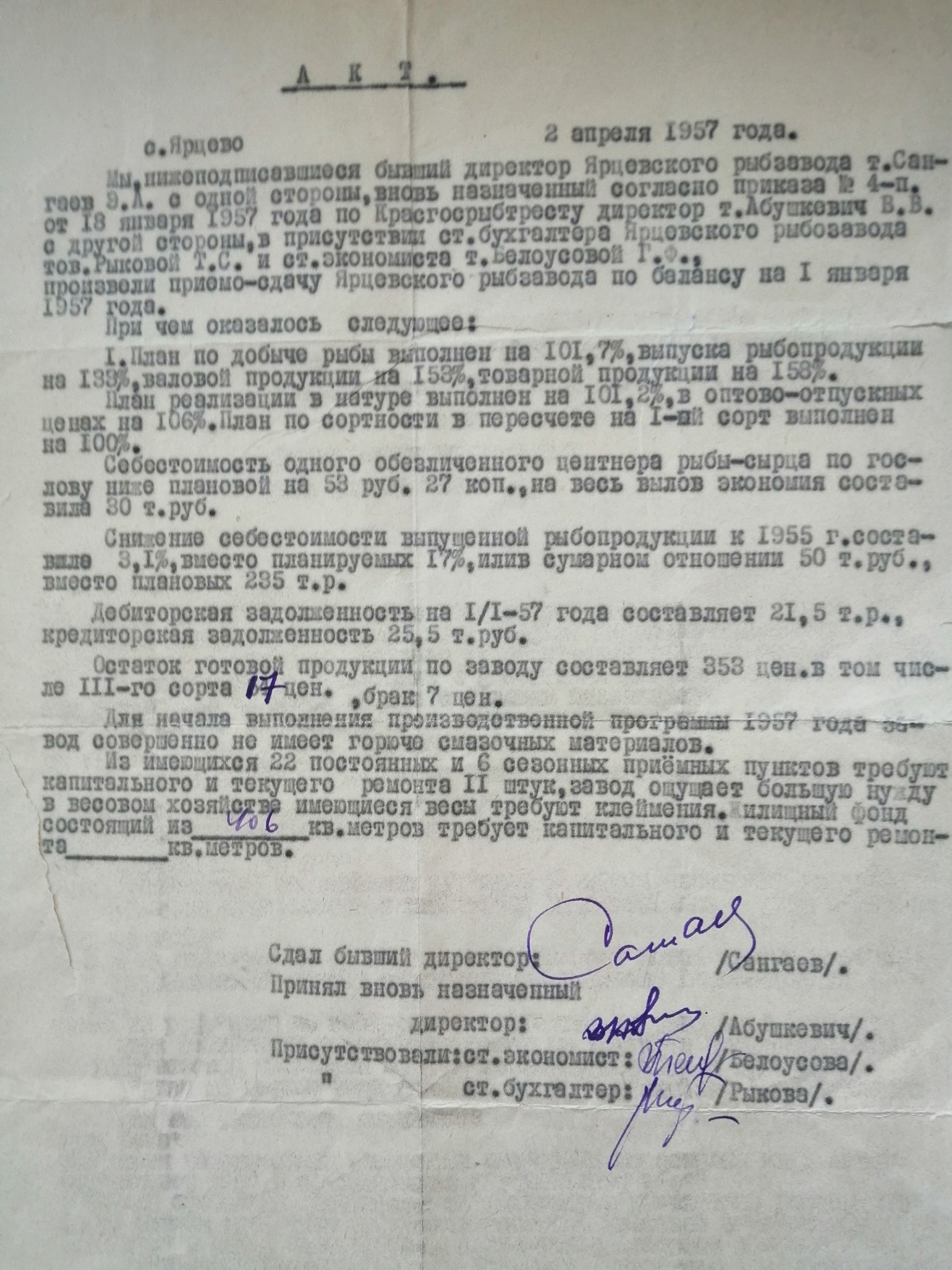 Акт сдачи Ярцевского рыбного завода его бывшим директором Сангаевым в 1957 году.